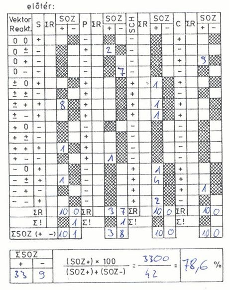 Szondi-teszt, saját tesztfelvétel, a vsz. engedélyével